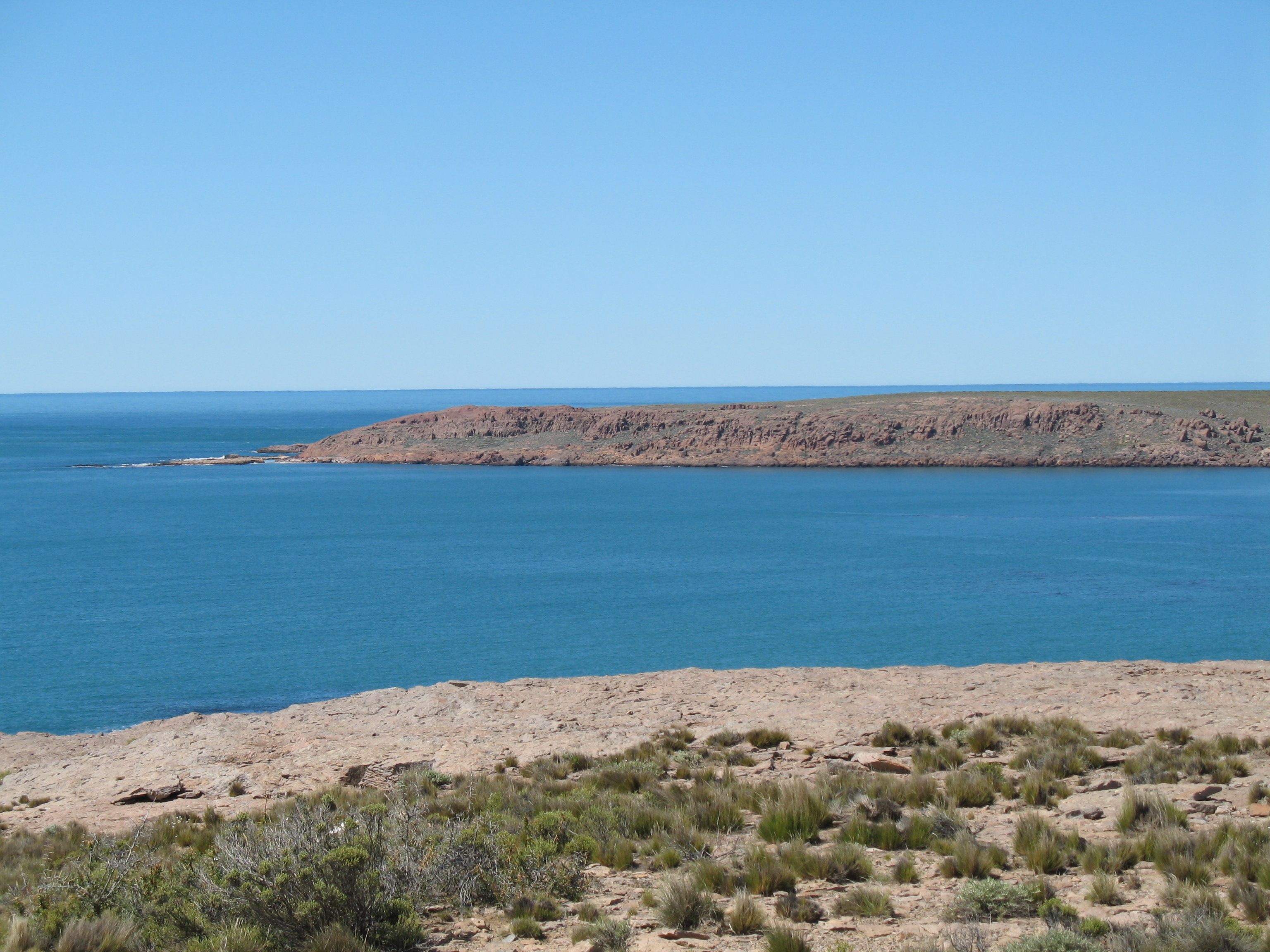 Vista de Punta Pozos desde el norte